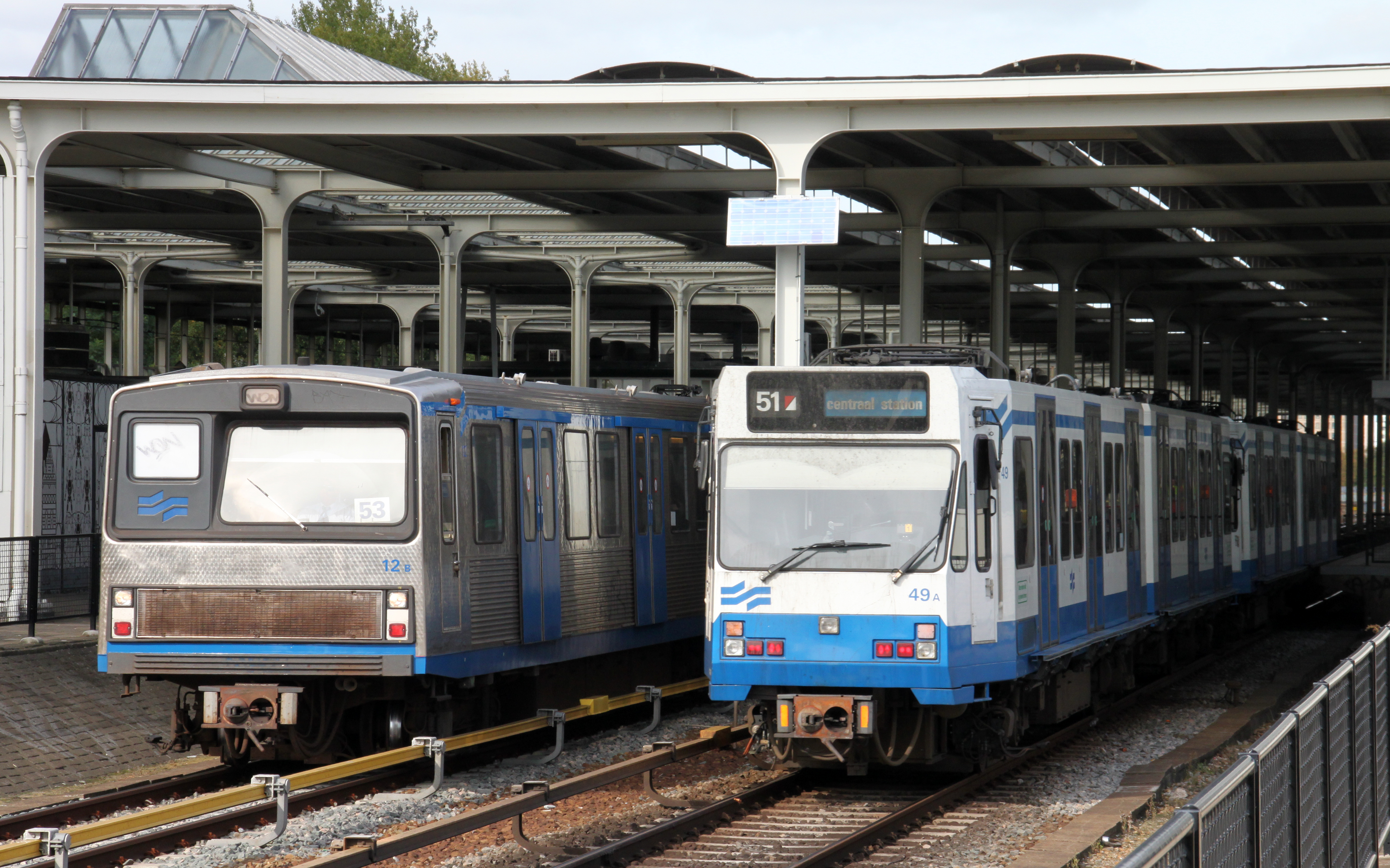 Twee metrotreinen te Amsterdam Amstel